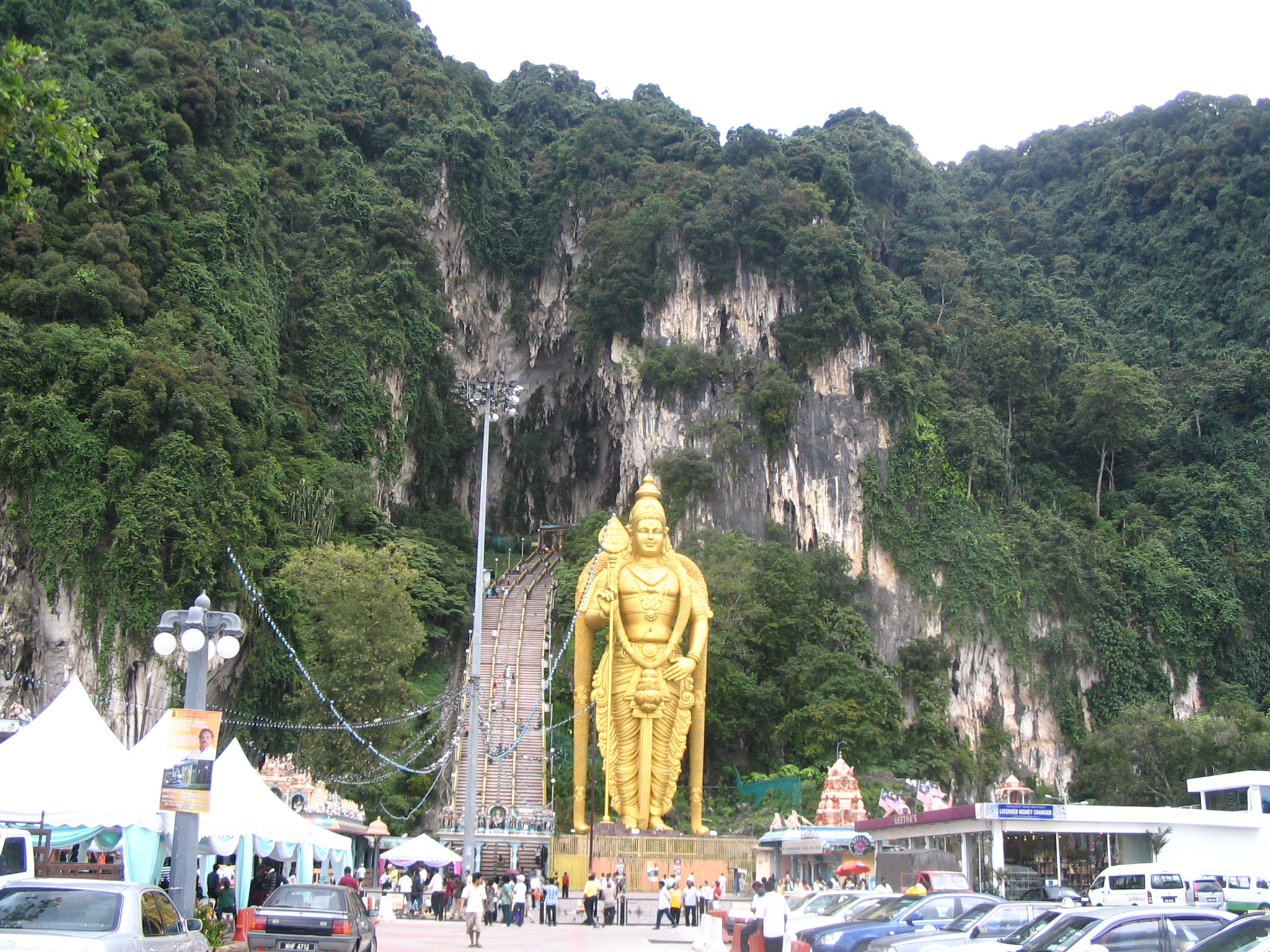 Batu caves - Malaisie - vue d'ensemble depuis le parking